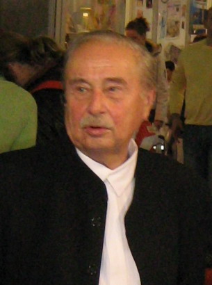 Милорад Павић (1929-2009), књижевник на сајму књига, 22. октобра 2007. у Београду.